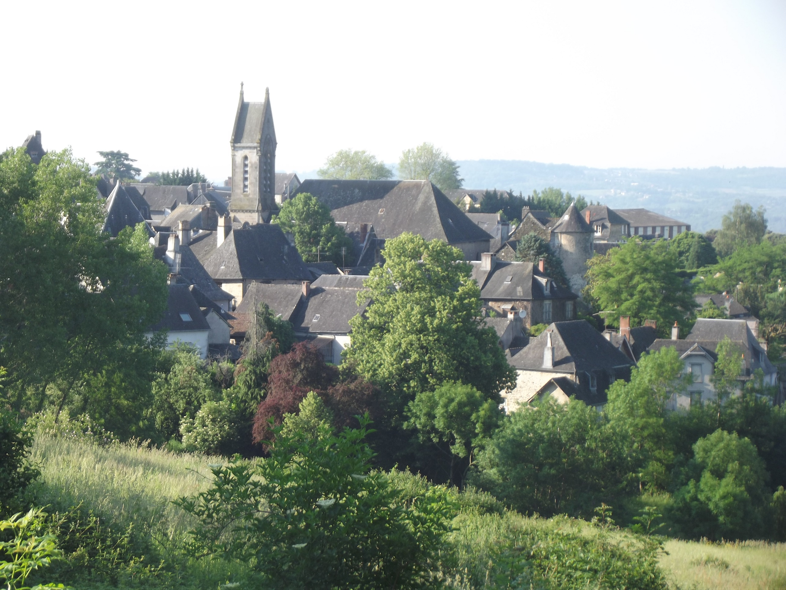 Vue de Juillac depuis la route menant à Arnac-Pompadour